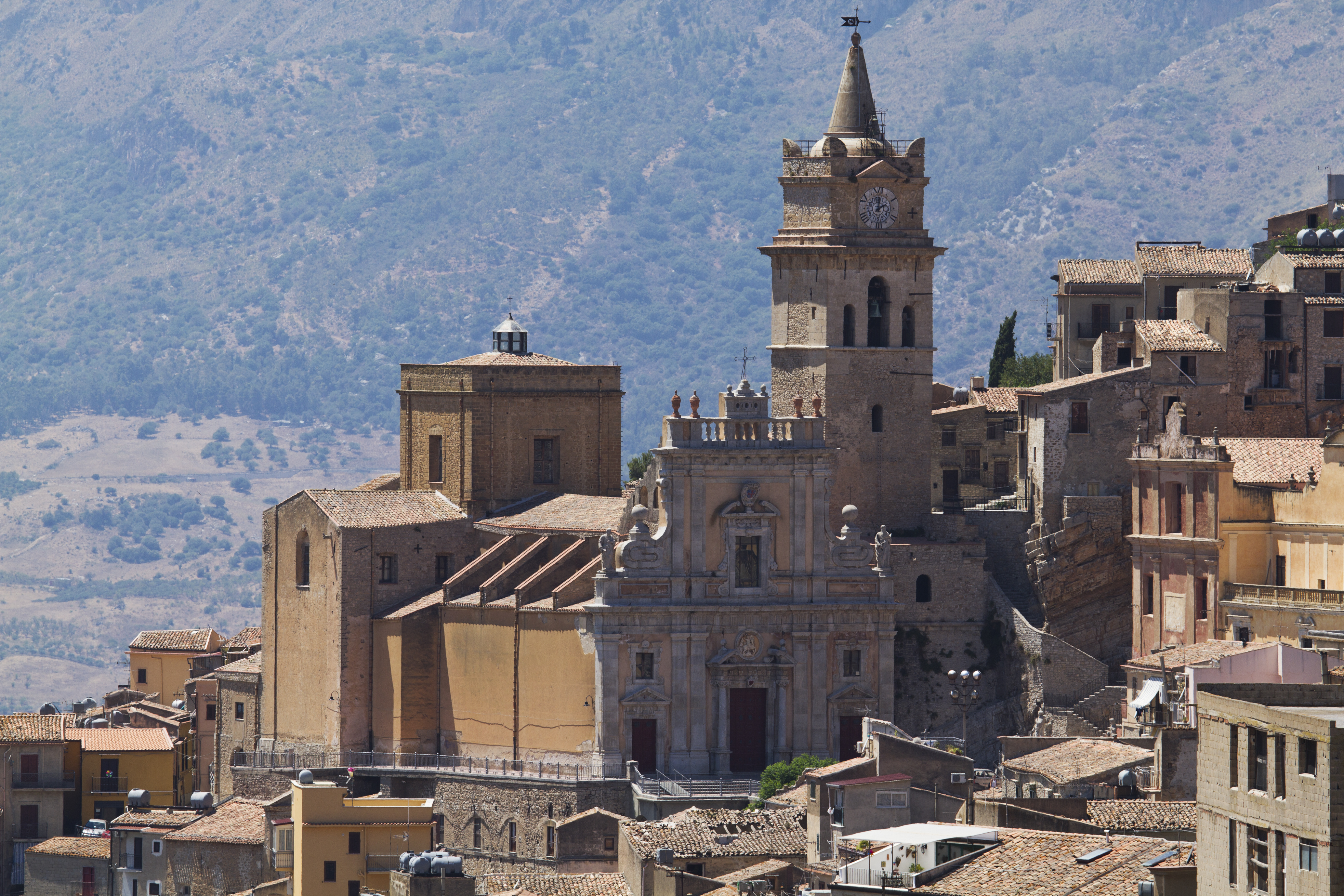 90012 Caccamo PA, Italy